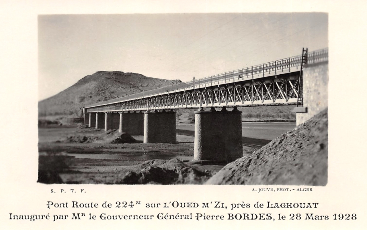 Pont route sur l'oued M'Zi, près de Laghouat (Algérie), 1928/